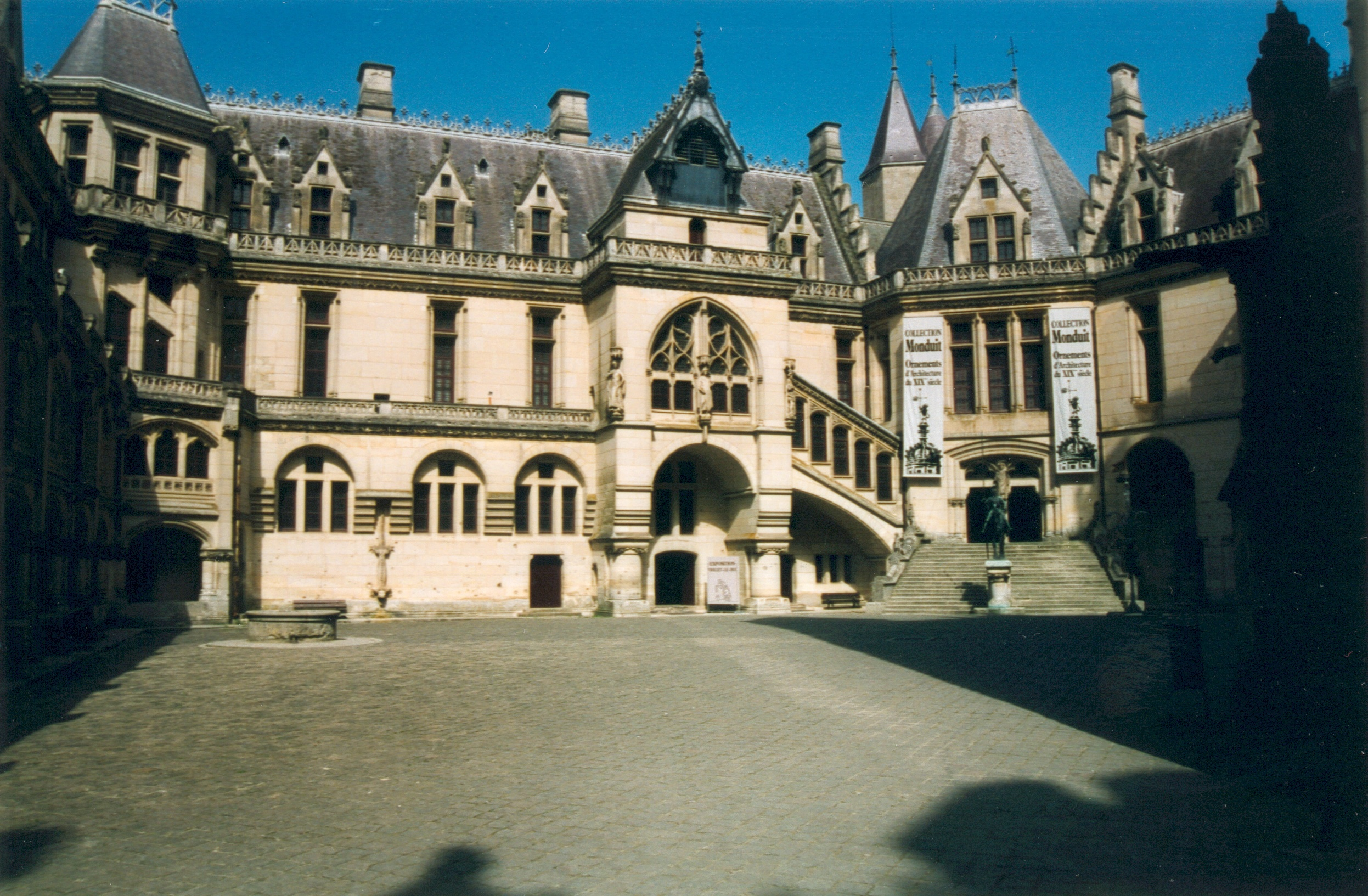 Pierrefonds Oise France Le château (cour) Photographie prise par Patrick GIRAUD